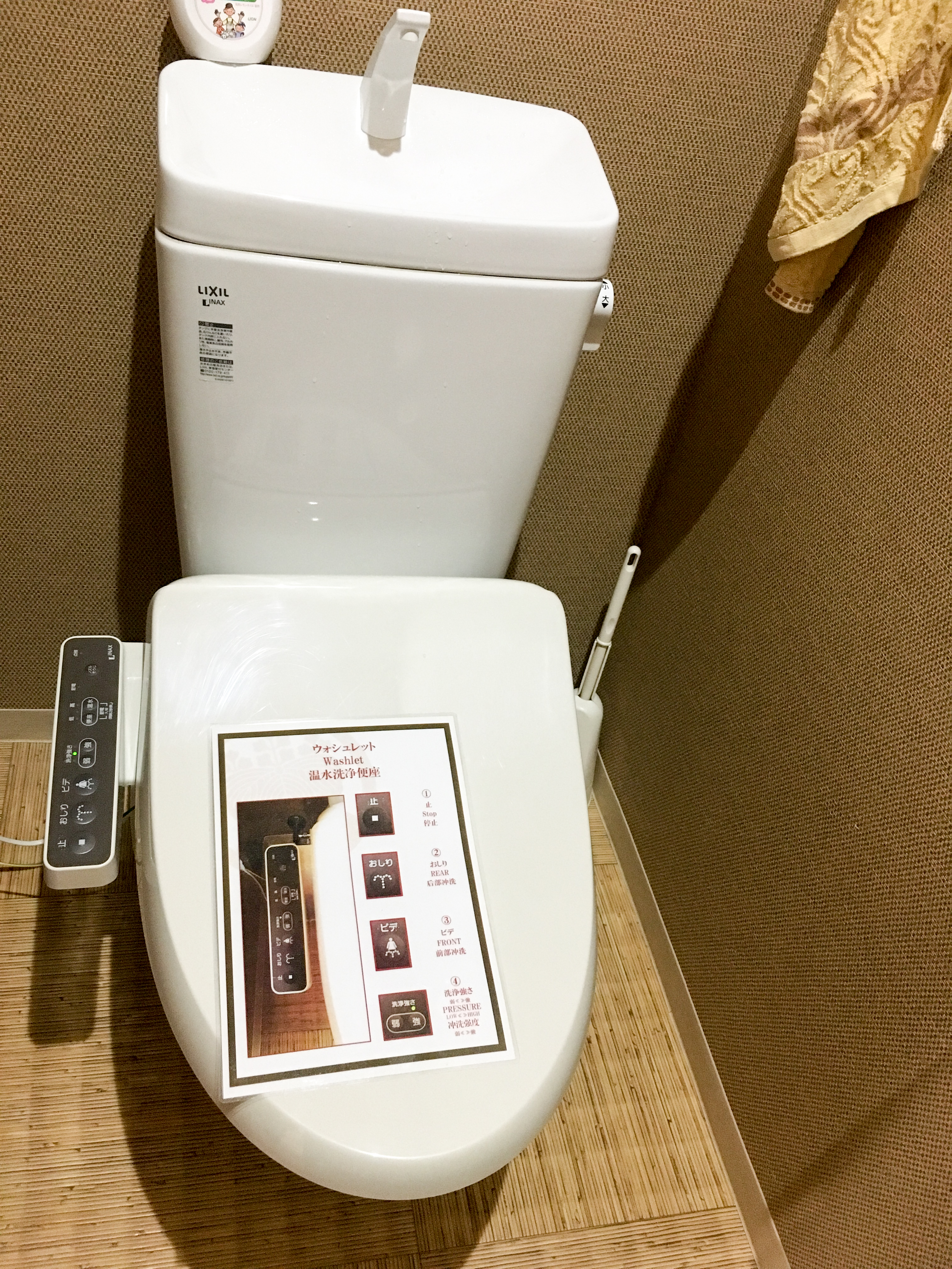 Kyoto